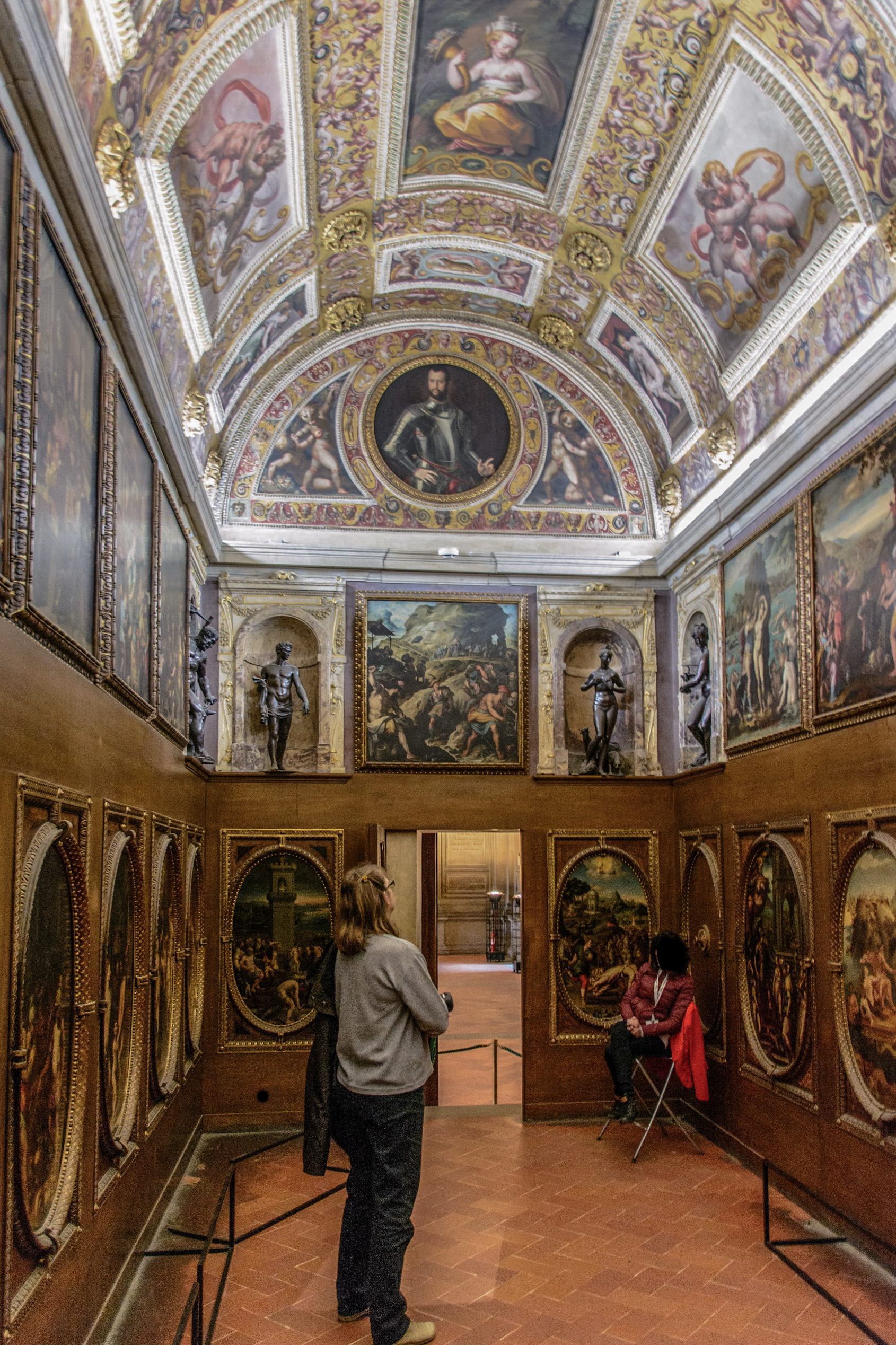 Studiolo im Palazzo Vecchio, Florenz, Italien / Studiolo at Palazzo Vecchio, Florence, Italy